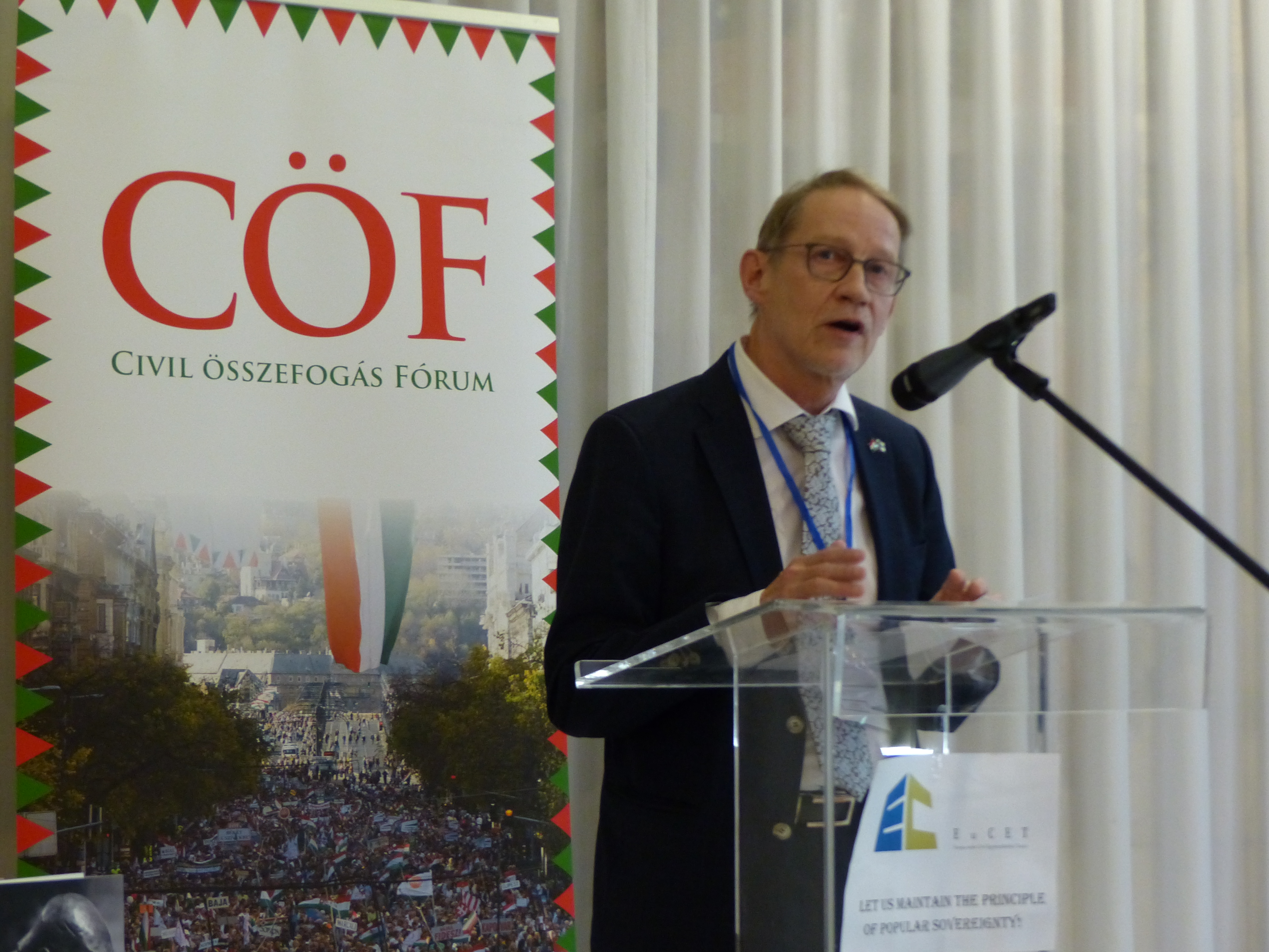 Ilmari Rostila. A felvétel 2019. április 25-én készült a Terézvárosban, a Benczur utca 35 szám alatti szállodában. EuCET – Európai Unios Civil Együttmüködési Tanács alakult.